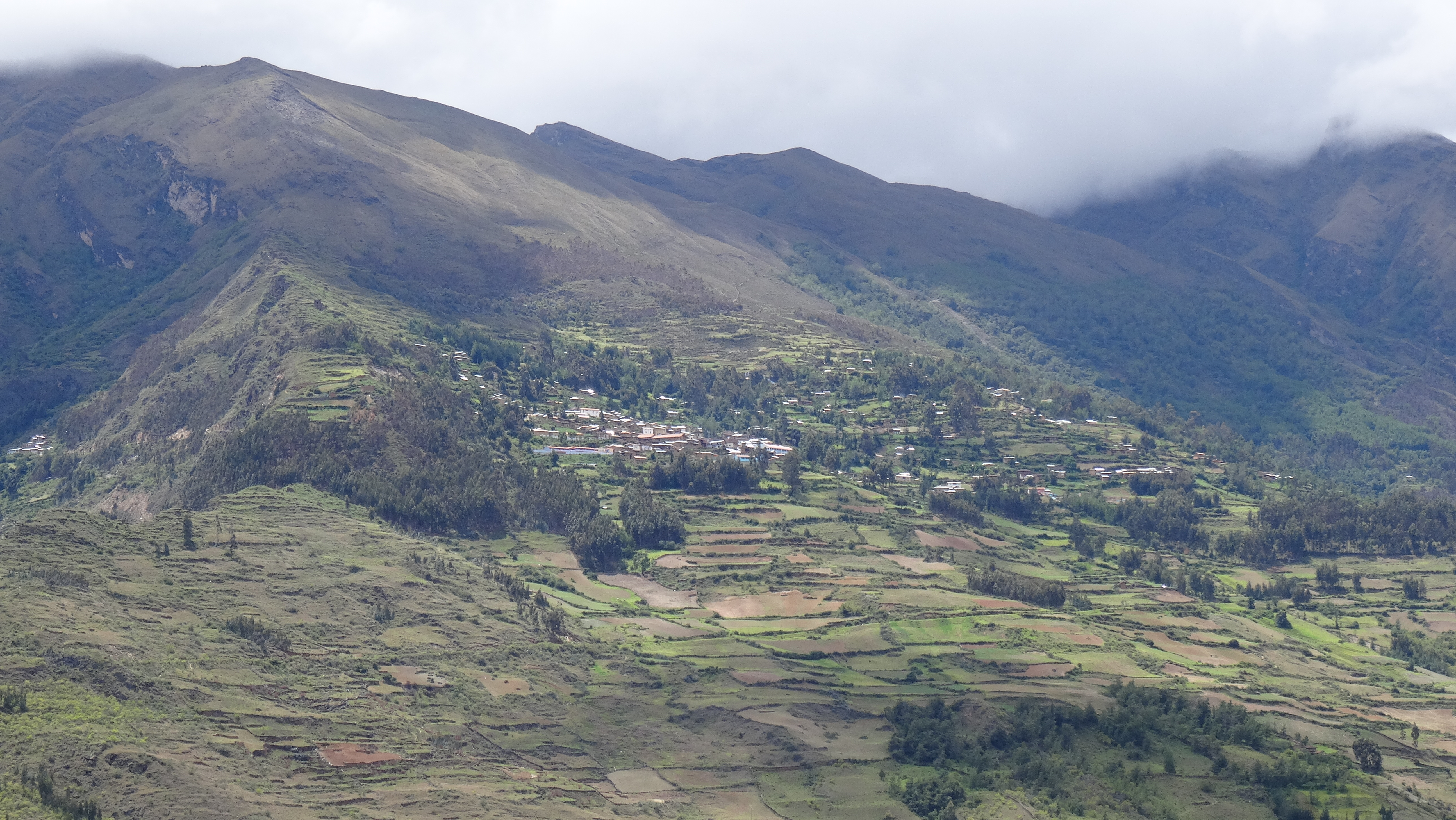 Poblado de Rapayán desde el fundo de Tarapampa/Tarabamba, Arancay.